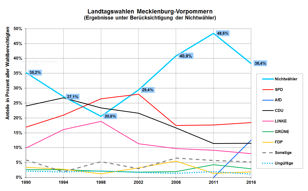 Historie des Anteils der Nichtwähler bei den Landtagswahlen in Mecklenburg-Vorpommern